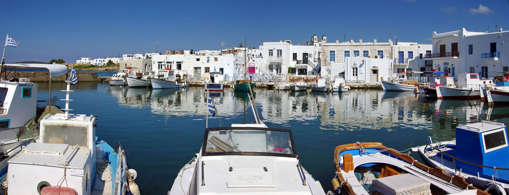 Fischereihafen Naoussa